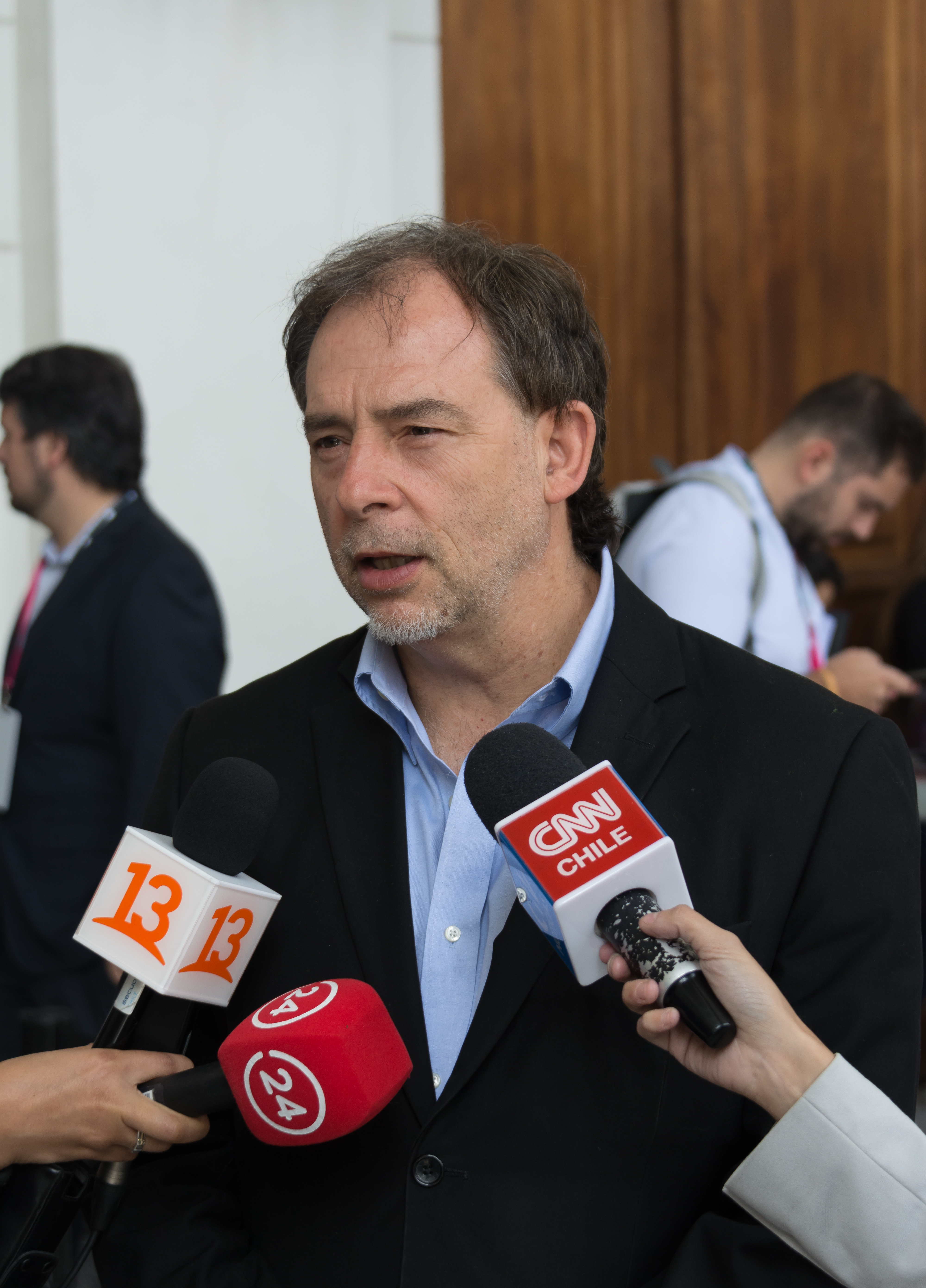 Guido Girardi, Congreso Futuro, Ex Congreso Nacional, Santiago, Región Metropolitana, Chile.